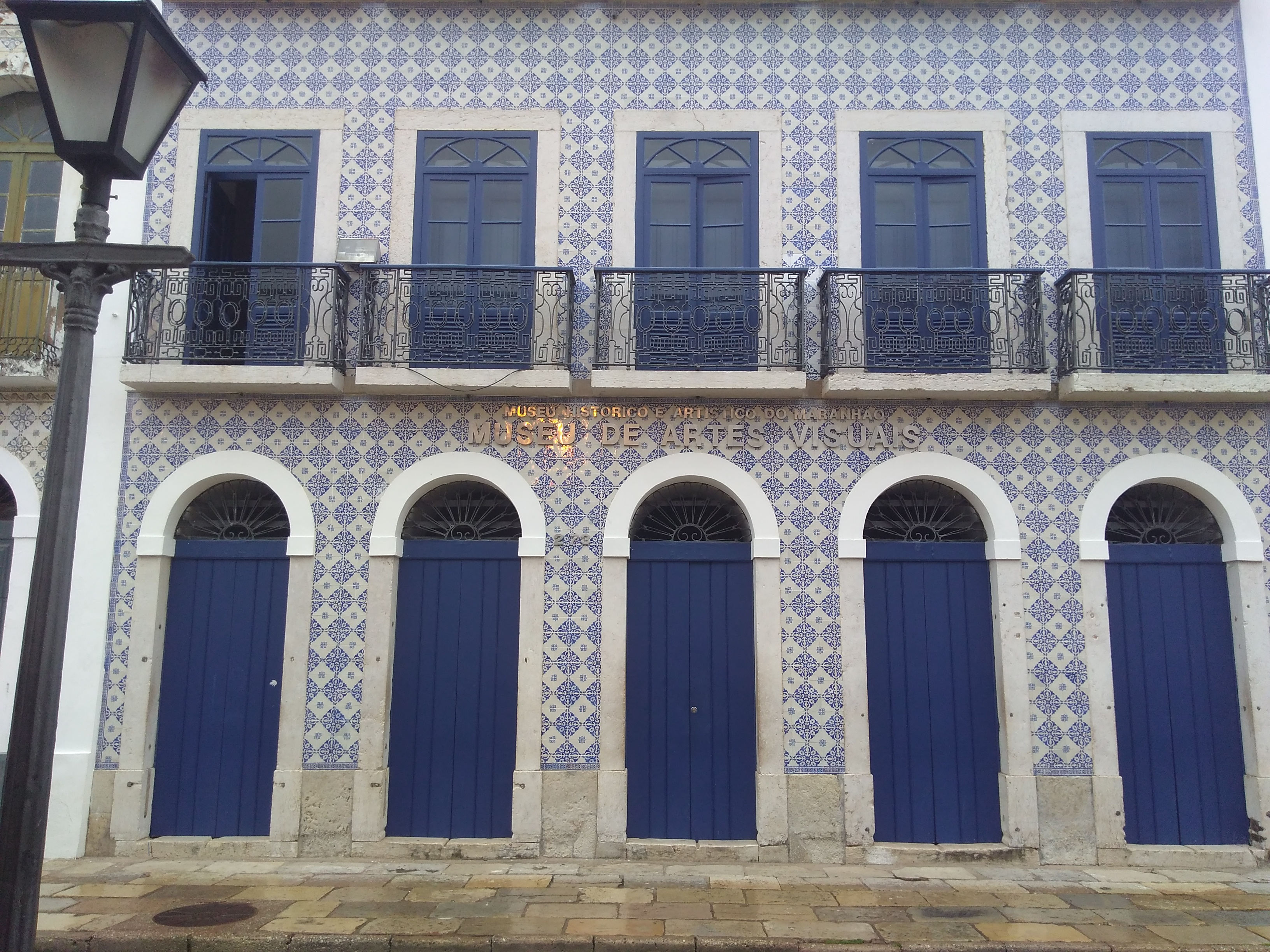 Museu de Artes Visuais de São Luís, MA